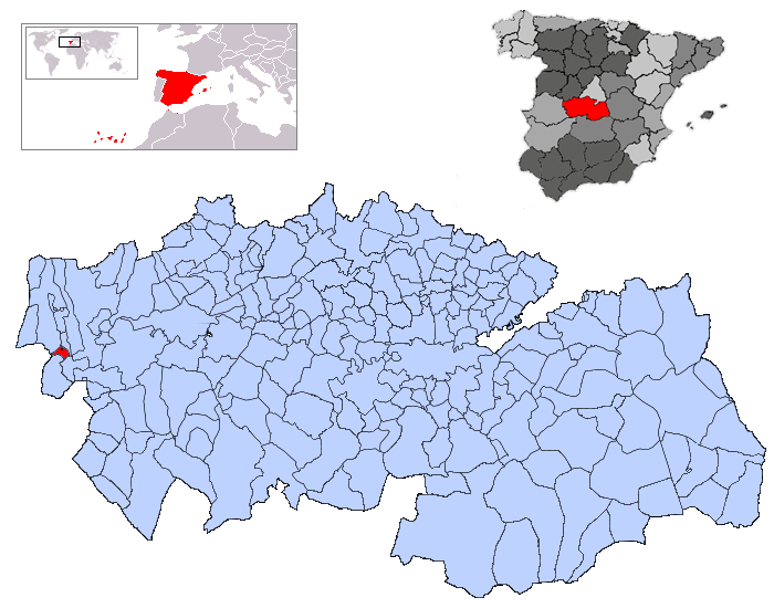 Caleruela en la provincia de Toledo